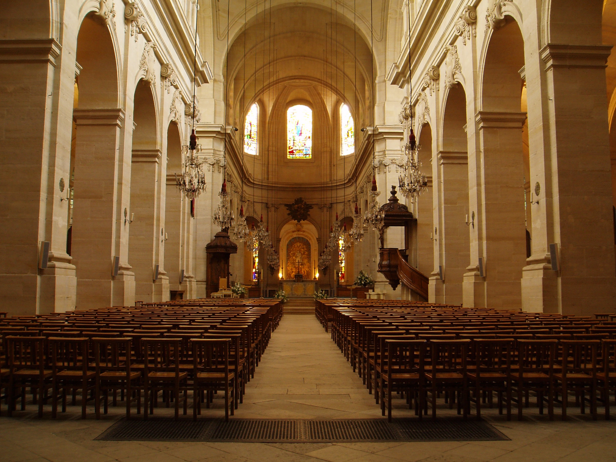 Cathédrale Saint-Louis de Versailles Architecte : Jules Hardouin Mansart de Sagonne Construction : 12 juin 1743 Inauguration : 24 août 1754 consacrée cathédrale en 1843